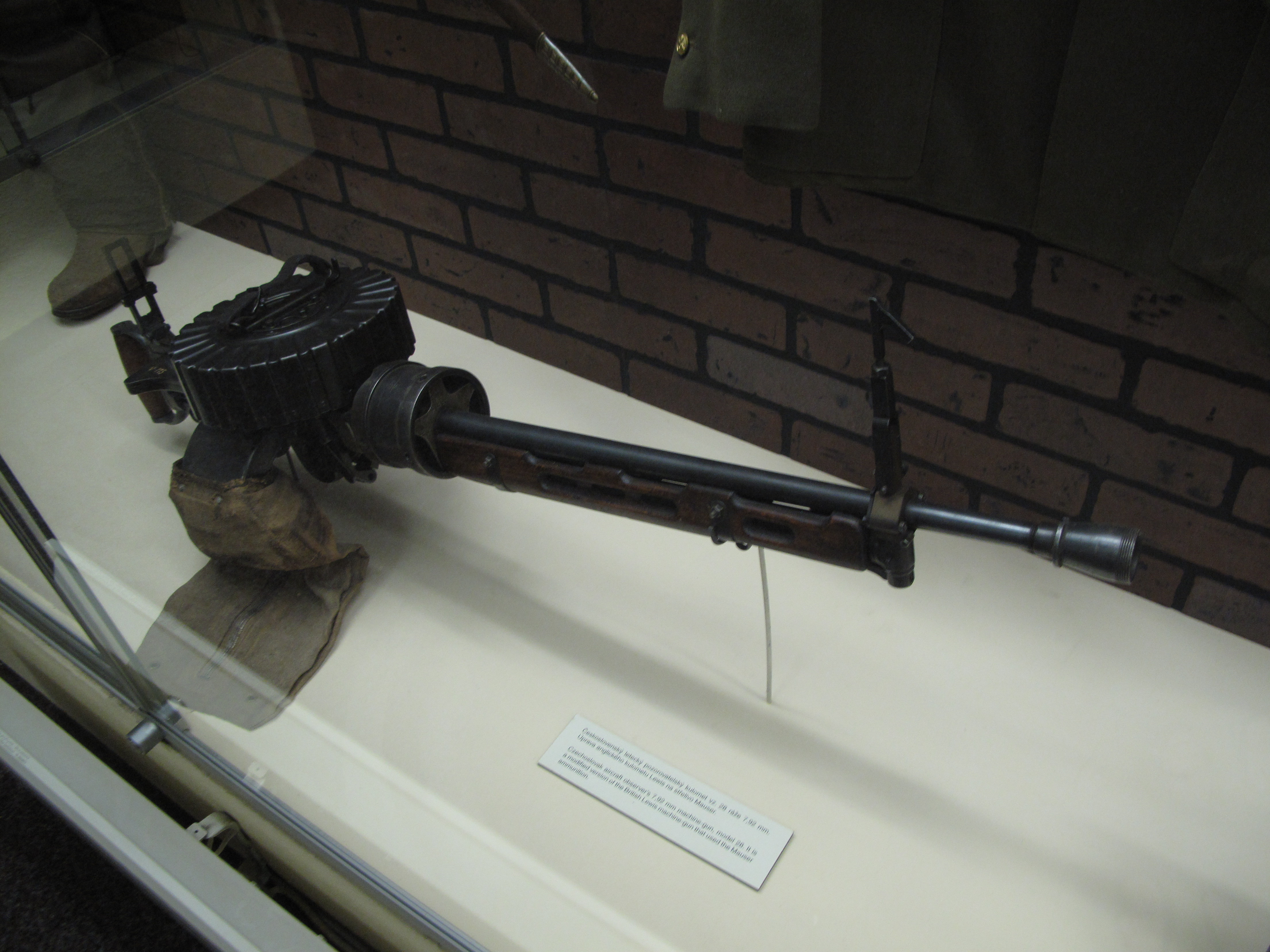 Letecké muzeum Kbely